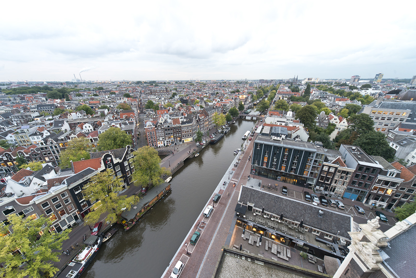 Off Westerkerk